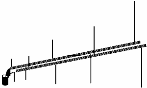 Nesimetrinė logoperiodinės antenos konstrukcija, pritaikyta naudoti su nesimetrine maitinimo linija.